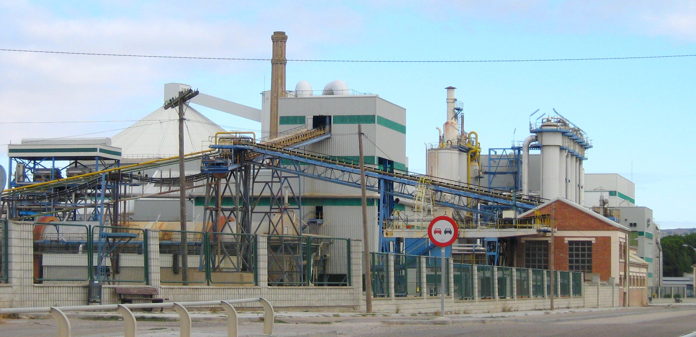 Peñafiel. Azucarera. Campo de Peñafiel. Ribera del Duero. Valladolid.